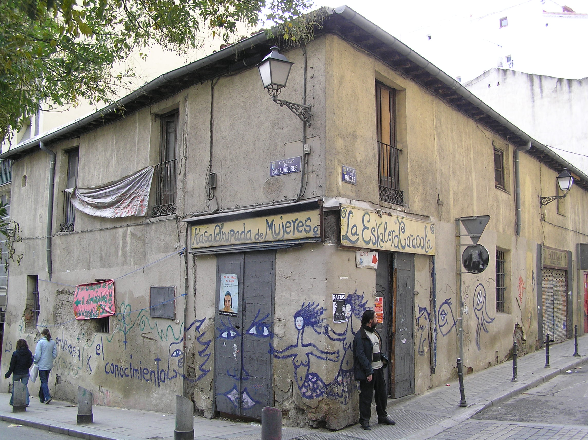 Eskalera Karakola, kasa okupada de mujeres de Madrid (España)